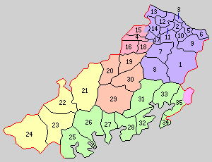 三重県度会郡の町村制時点の町村。